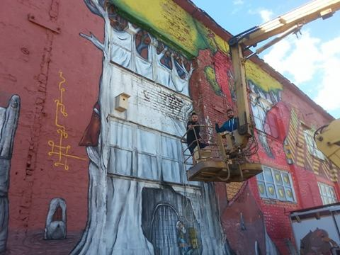 Мастакі ствараюць графіці на тэму аховы прыроды.